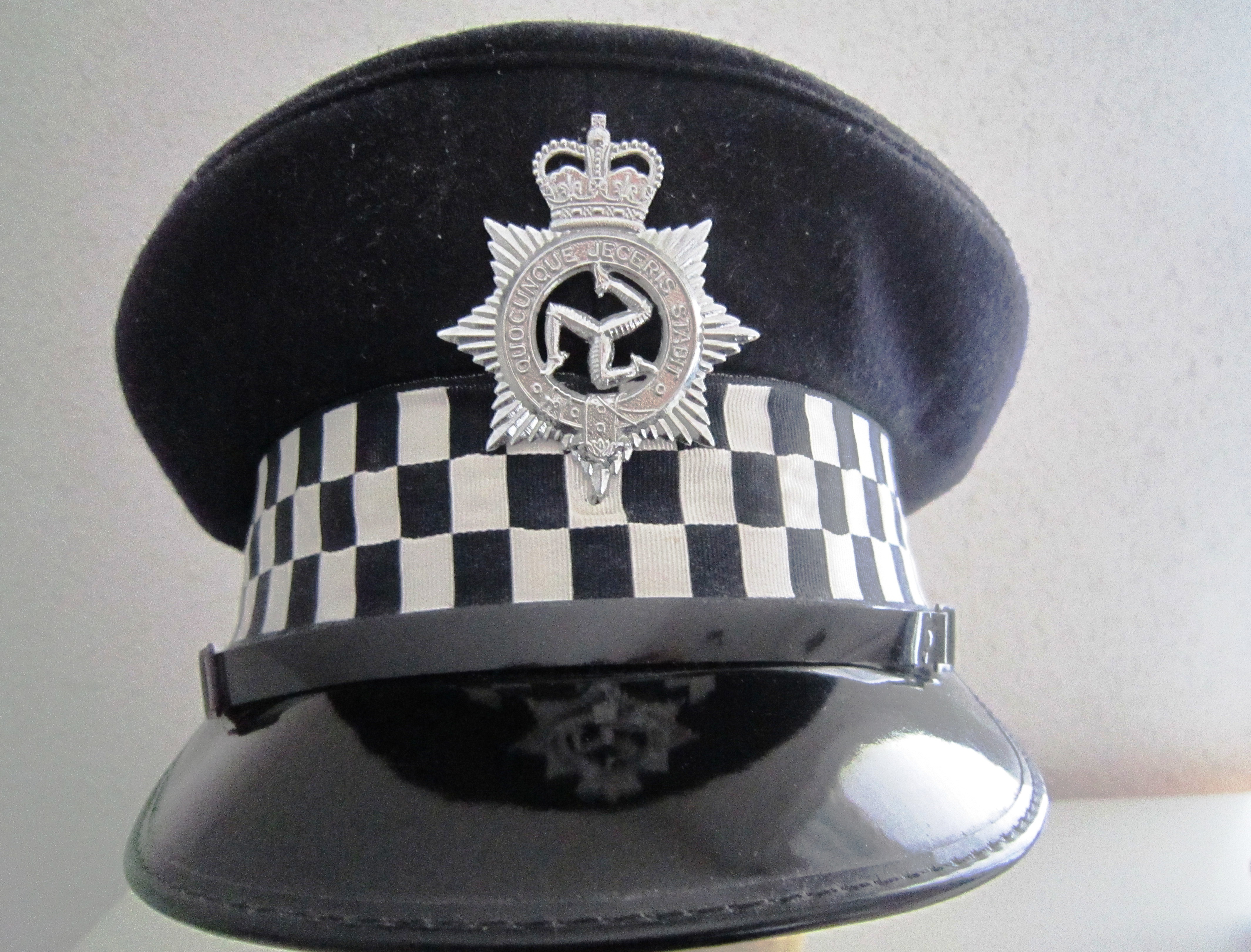 Politie pet uit Isle of Man